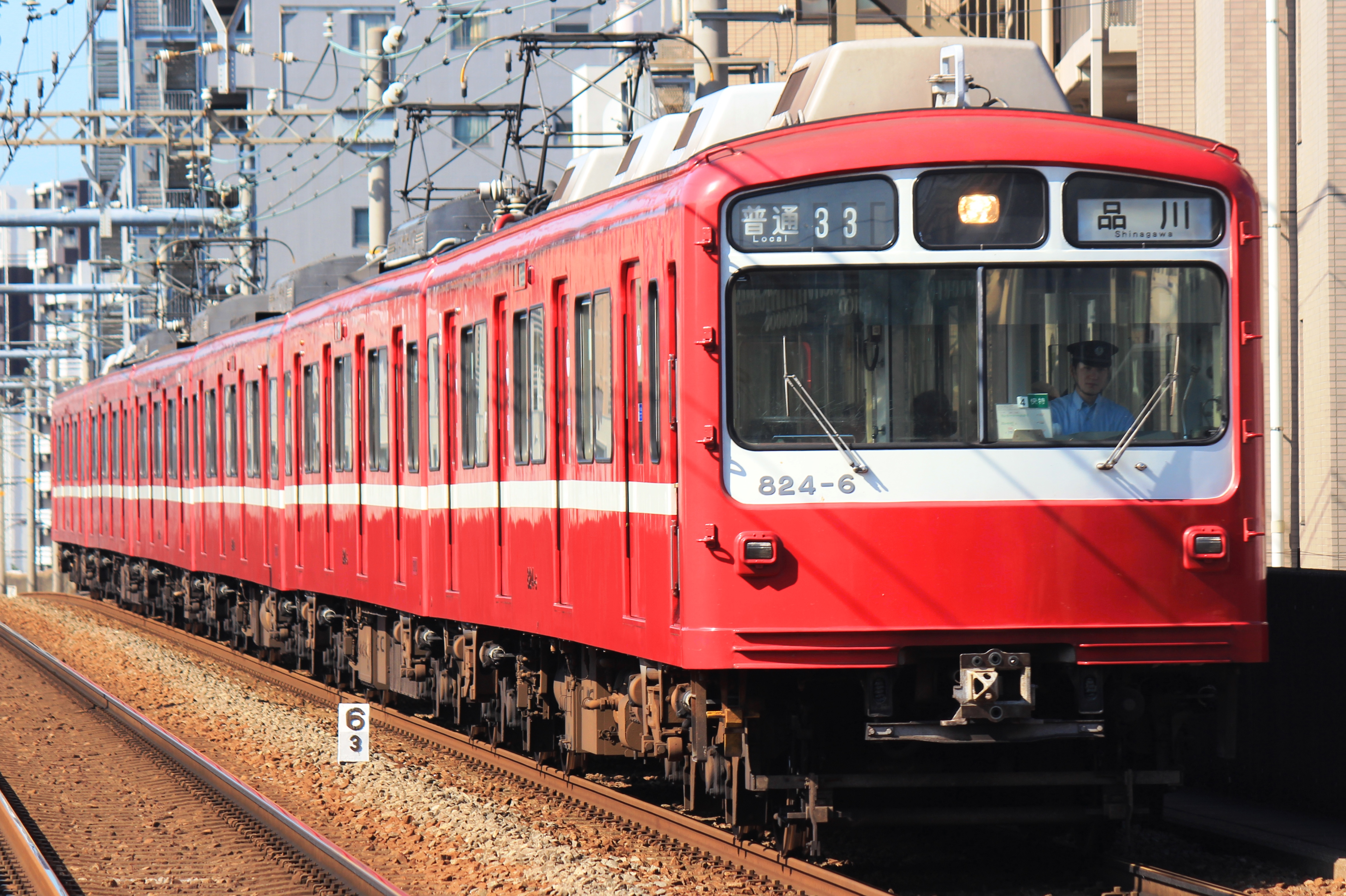 立会川に向けて走行する京急800形